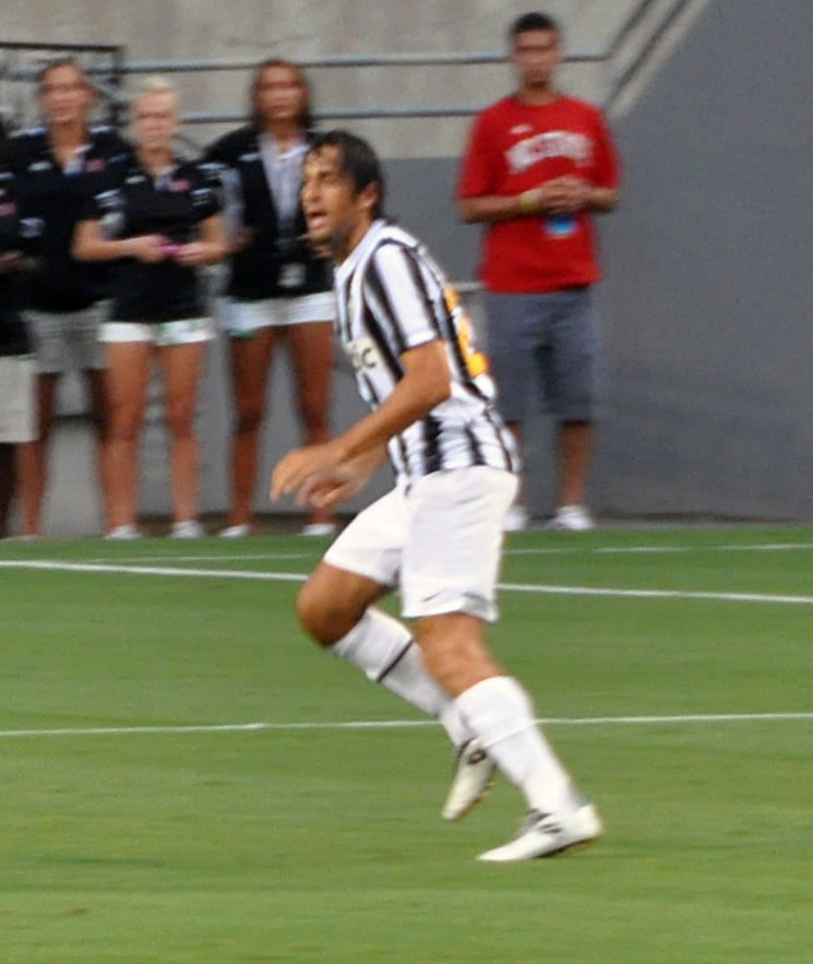 7/28/11 Guadalajara Chivas vs Juventus FC at Carter-Finley Stadium, Raleigh, NC. Bianconeri's forward Luca Toni.